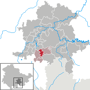 Schmiedefeld in Thuringia - District Saalfeld-Rudolstadt